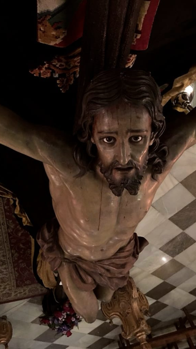 Santísimo Cristo de la Expiración, hermandad escolapios, Granada